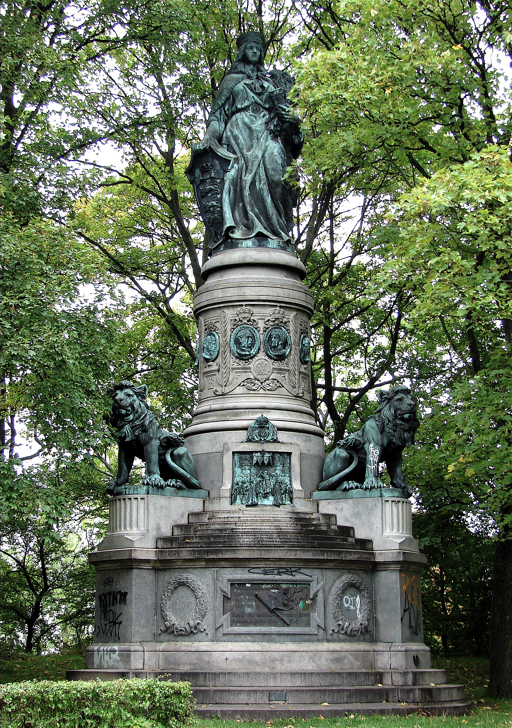 Danmarksmonumentet, Louis Hasselriis, 1892, København